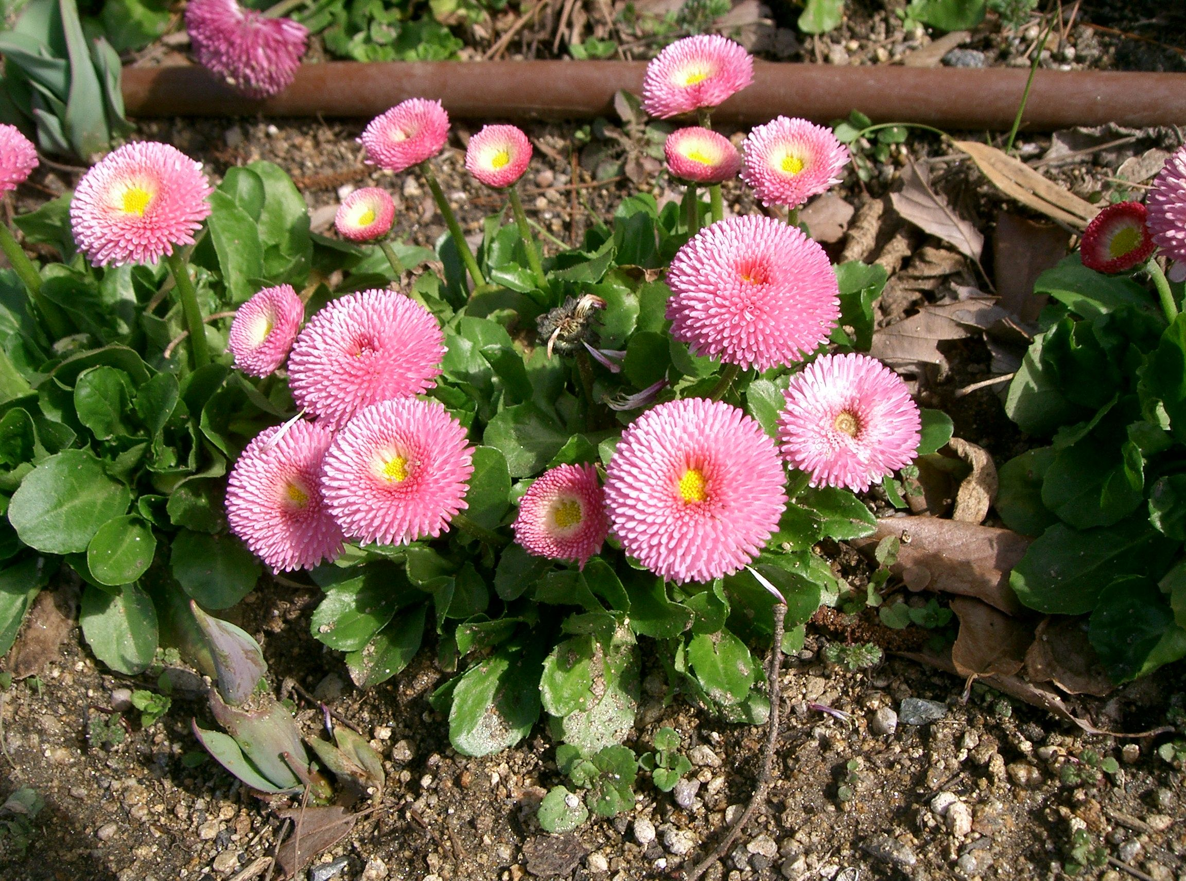 Bellis perennis